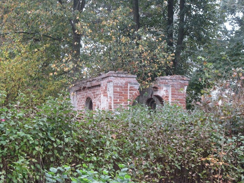 Сюлкі. Пахавальня